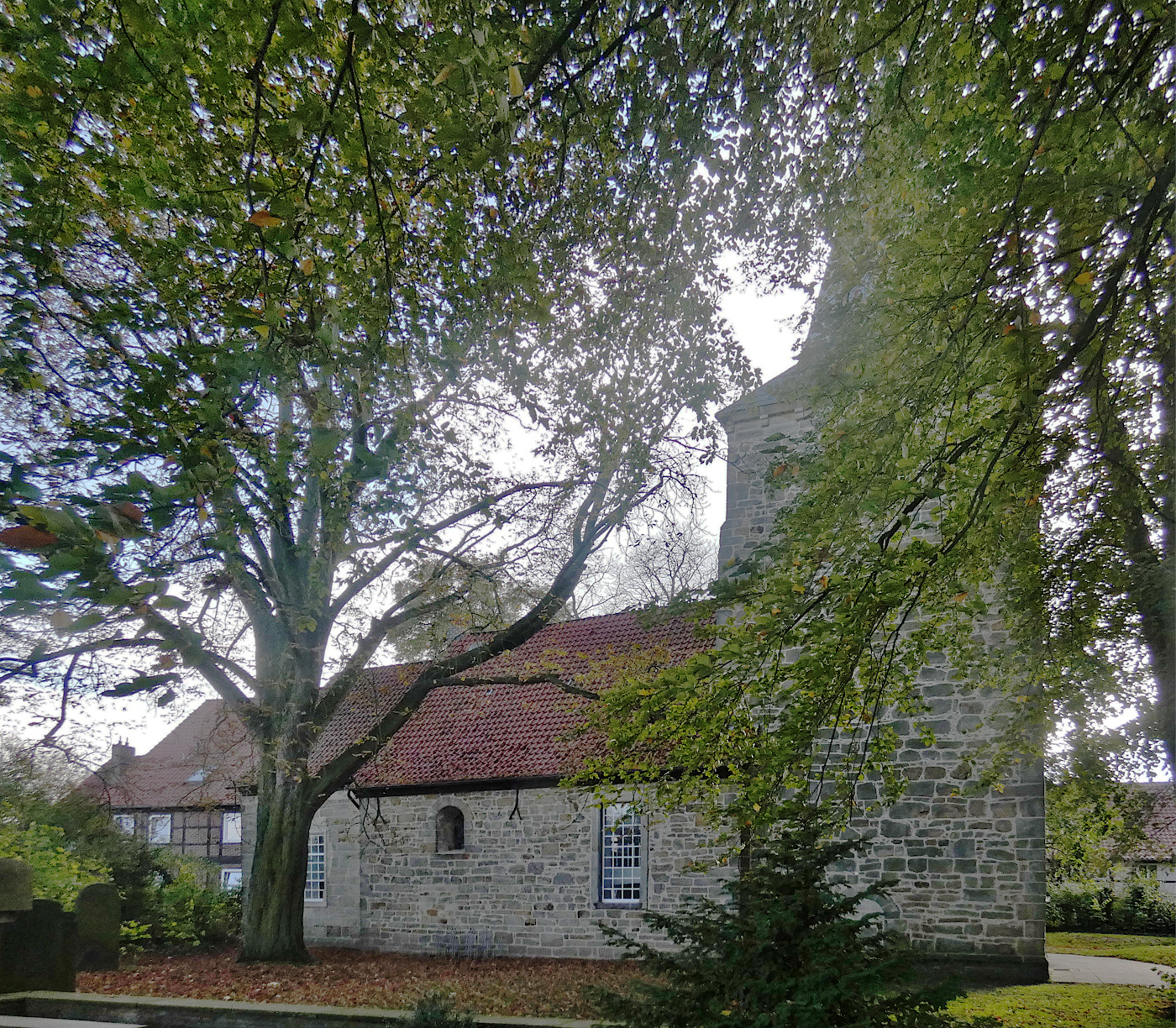 Ein denkmalgeschütztes Kirchengebäude in Hiddestorf, Stadt Hemmingen, Niedersachsen